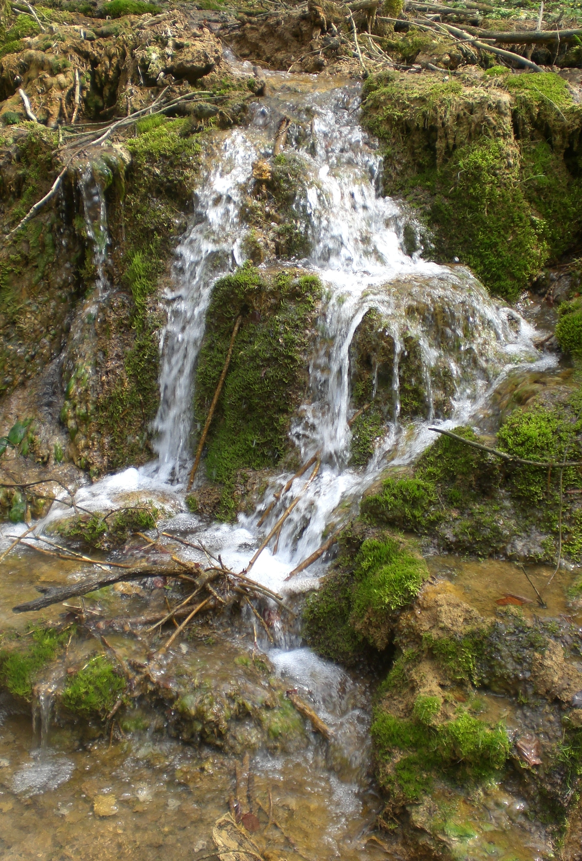 Lillach Sinterterasse